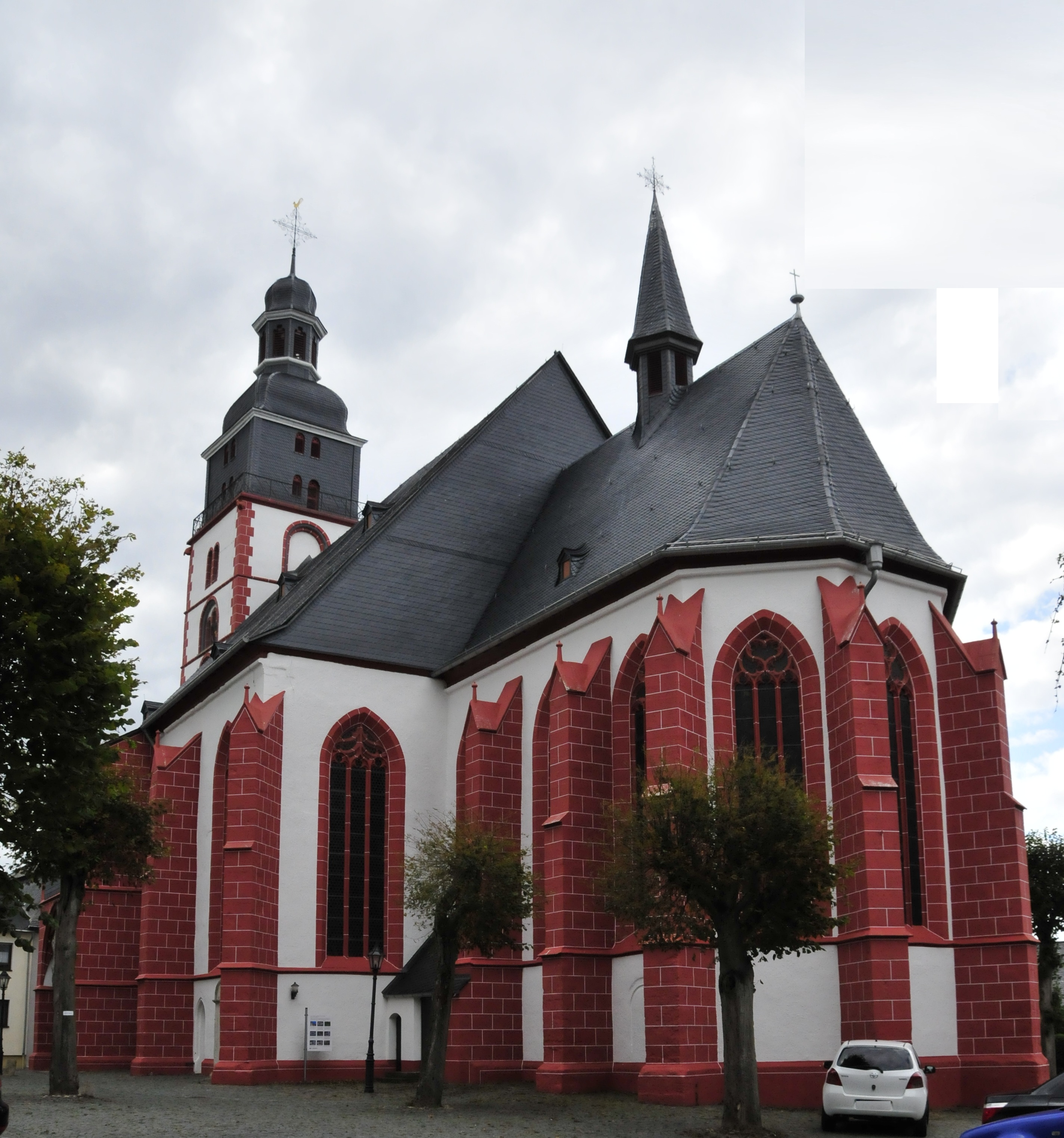 St.-Michaelis-Kirche in Kirchberg (Hunsrück)